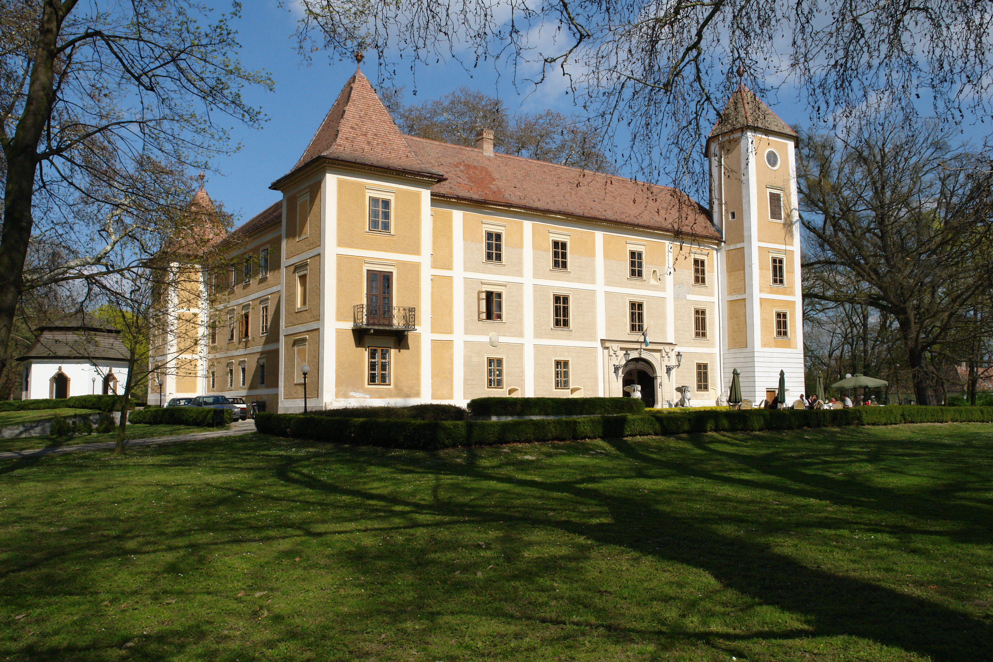 Khuen–Héderváry-kastély, Hédervár This is a photo of a monument in Hungary. Identifier: 4448